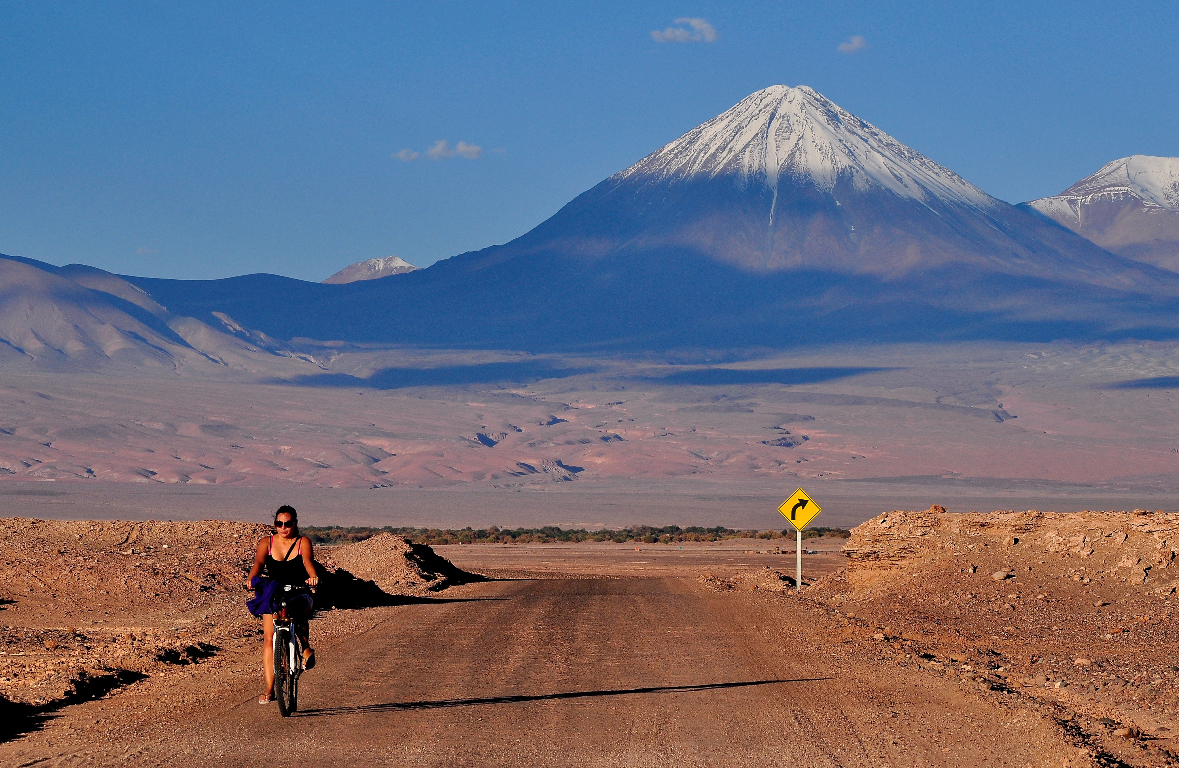 Volcan Licancabur visto desde el Valle de la Luna